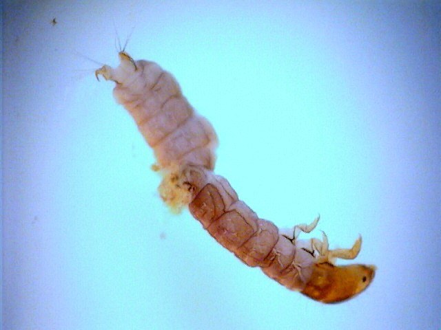 Lype diversa larva